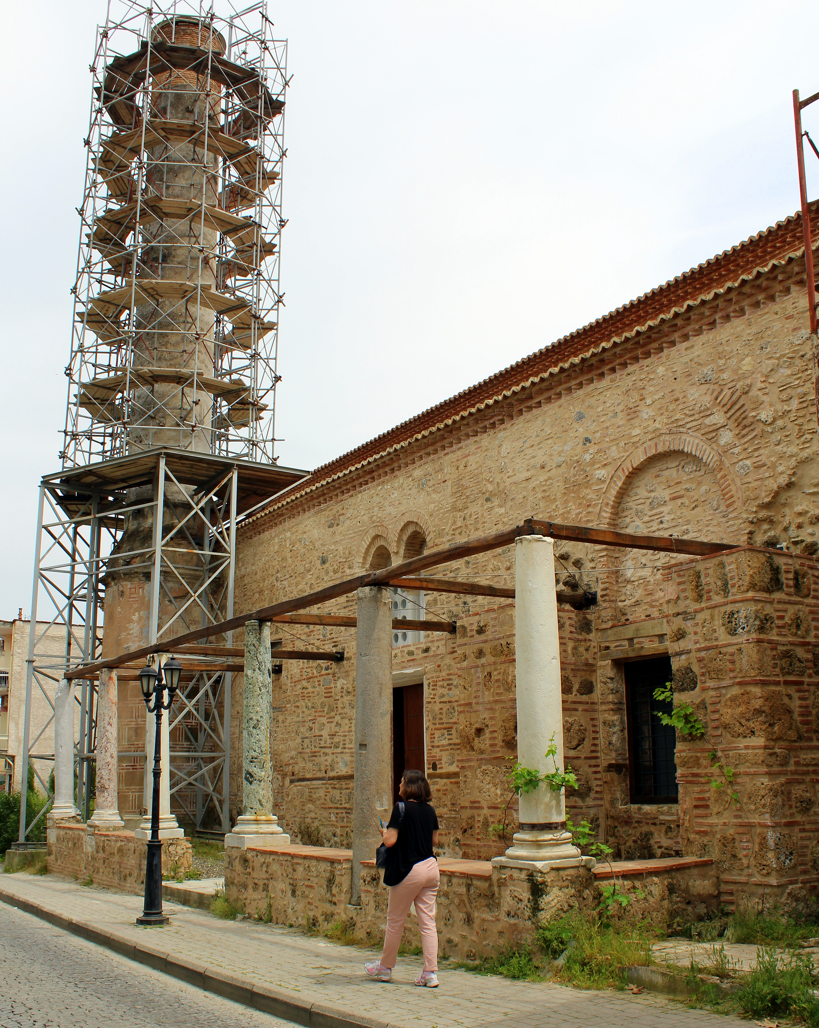 Ναός Παλαιάς Μητρόπολης Βέροιας«Ναός Παλαιάς Μητρόπολης Βέροιας»